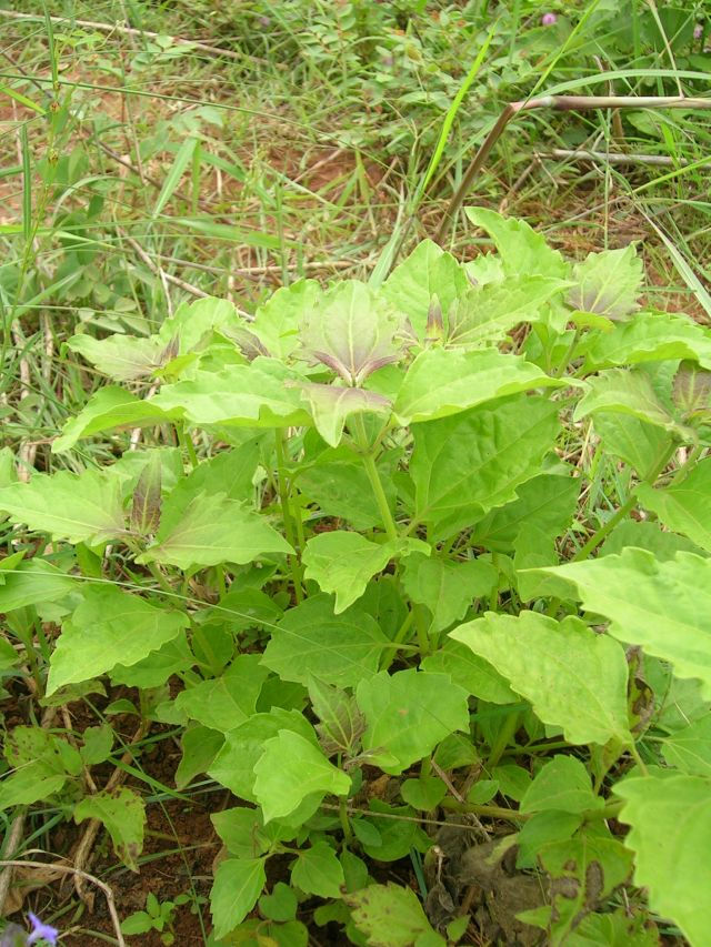 Chromolaena odorata, Siam Weed